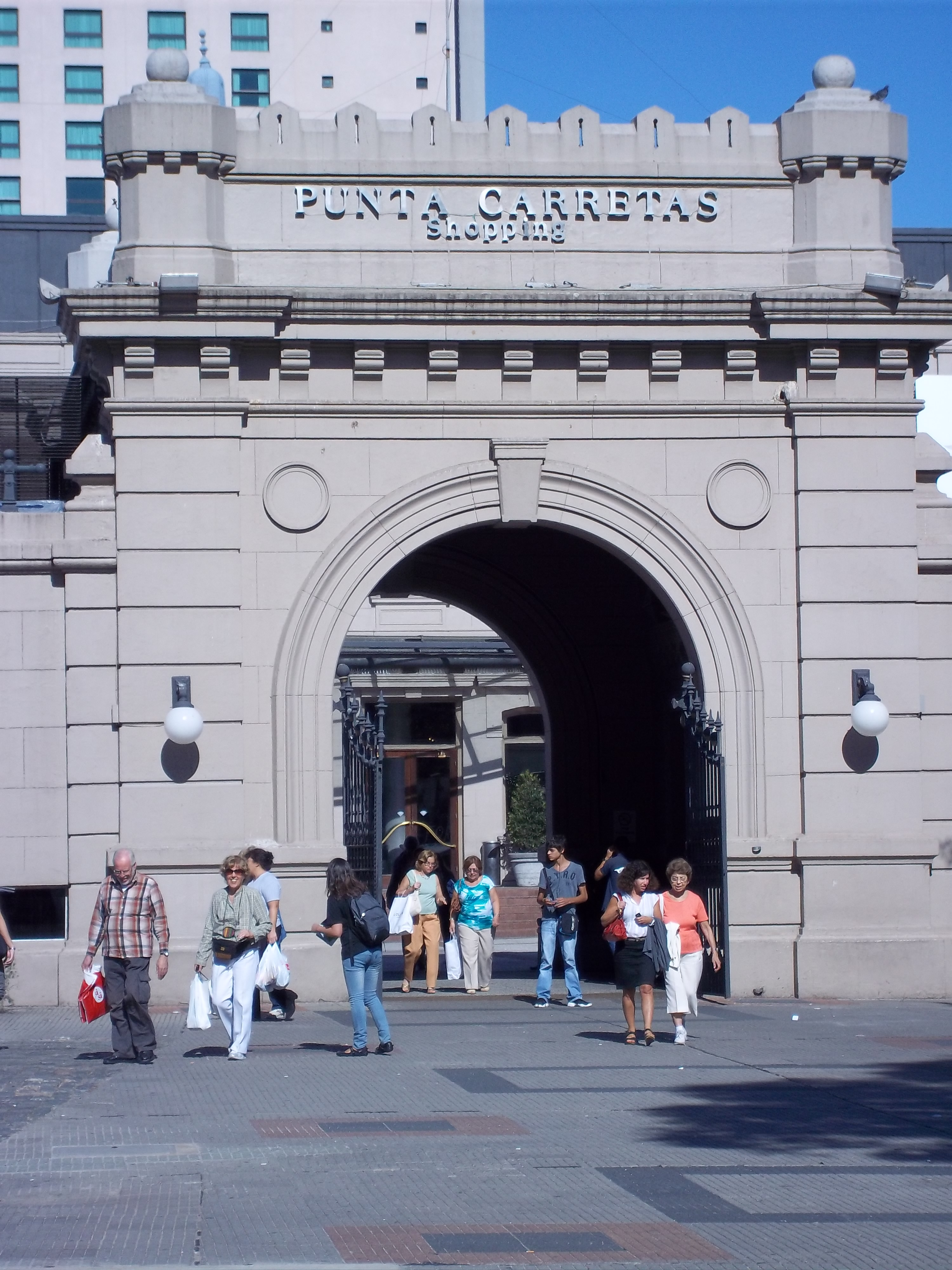 Entrada principal del Punta Carretas Shopping, Montevideo, Uruguay.